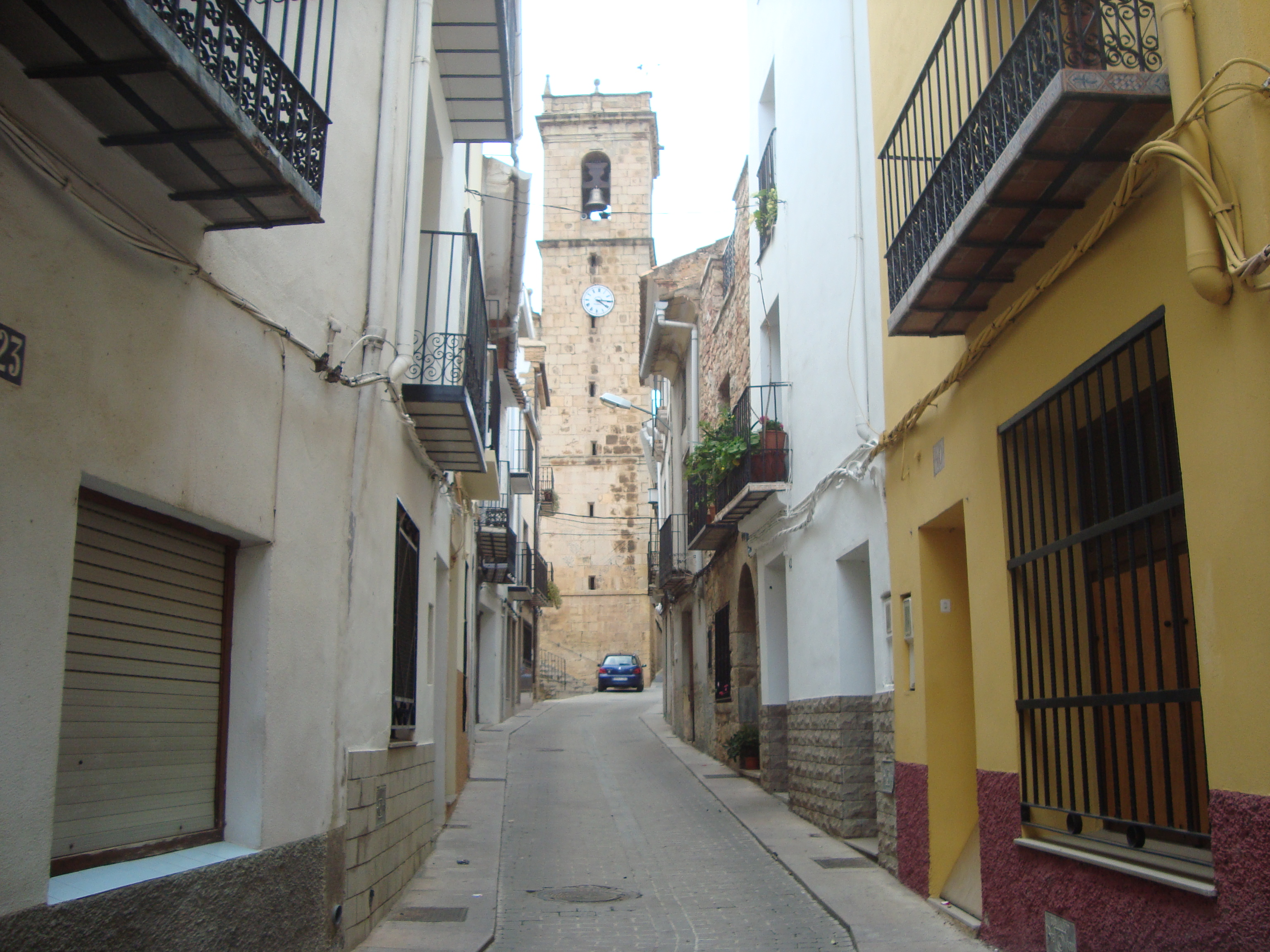 Calle de Useras/Les Useres